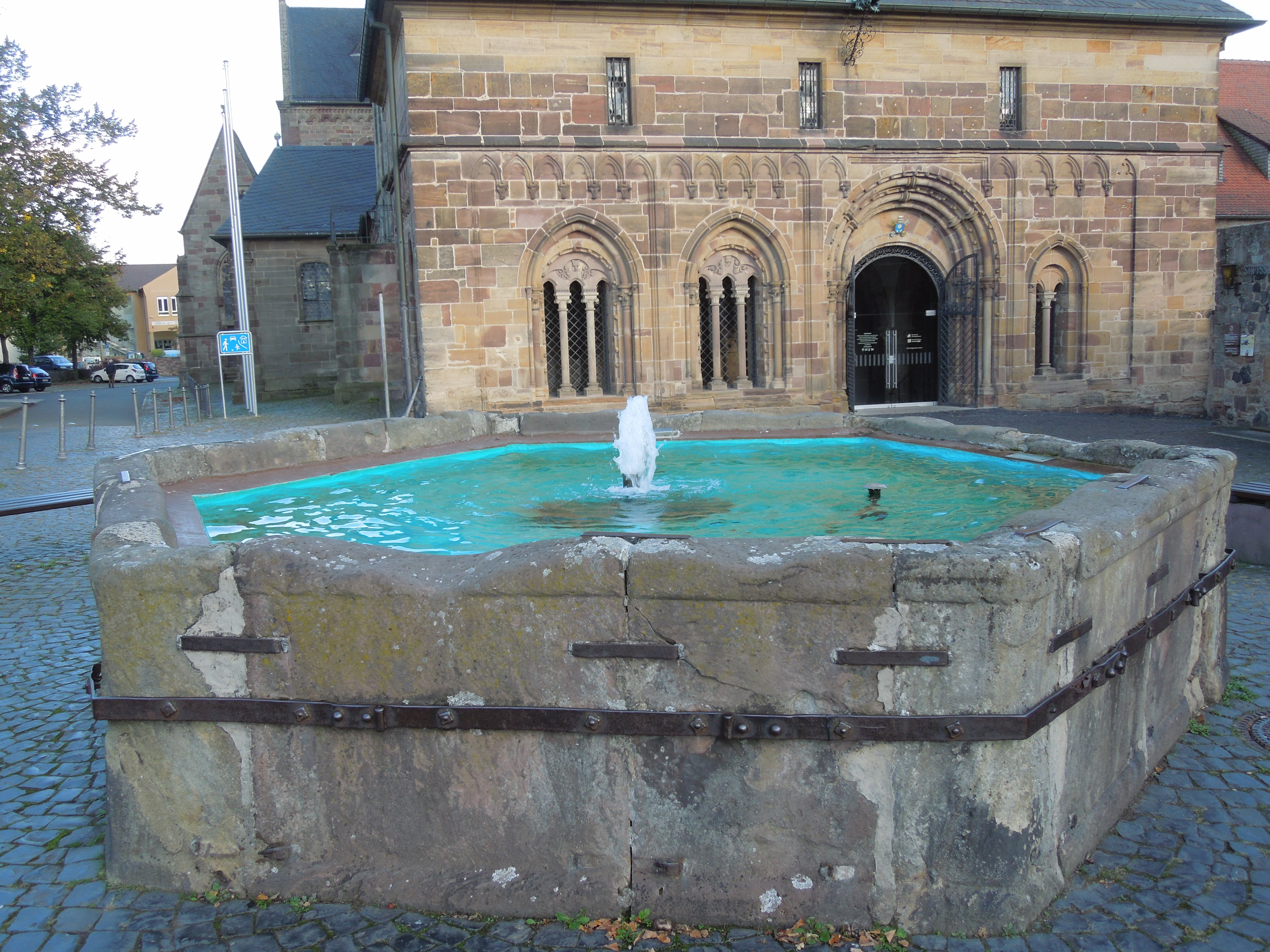 Der Kump auf dem Domplatz in Fritzlar